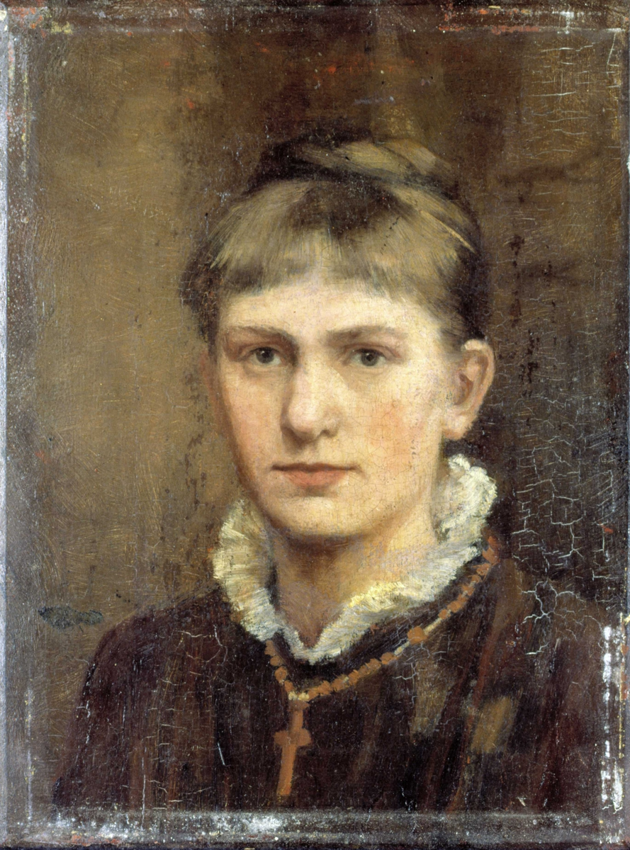 Selvportrett av Cecilie Dahl. Selvportrett. Brystbilde, en face. Hår gråbrunt med svarte skygger. Pannehår. Flettetopp høyt på hodet. Ansikt rosa. Øyne grå. Gråhvit oppadstående rysj i halsen. Kjole brun med svarte skygger. Om halsen, liggende på kjolen, brunt perlekjede med brunt kors. Bakgrunnen gråbrun.